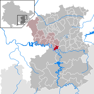 Eßbach in Thuringia - Saale-Orla-Kreis